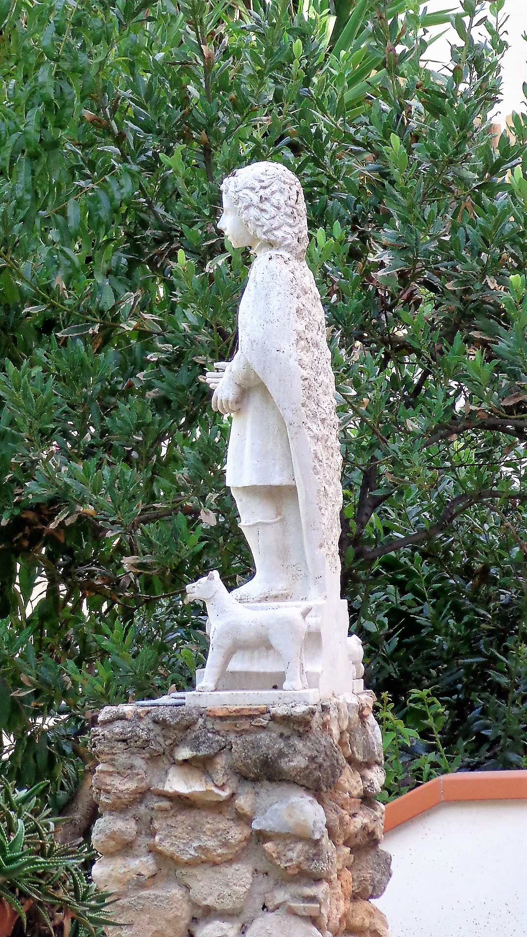 Statua esterna di San Vito Martire.